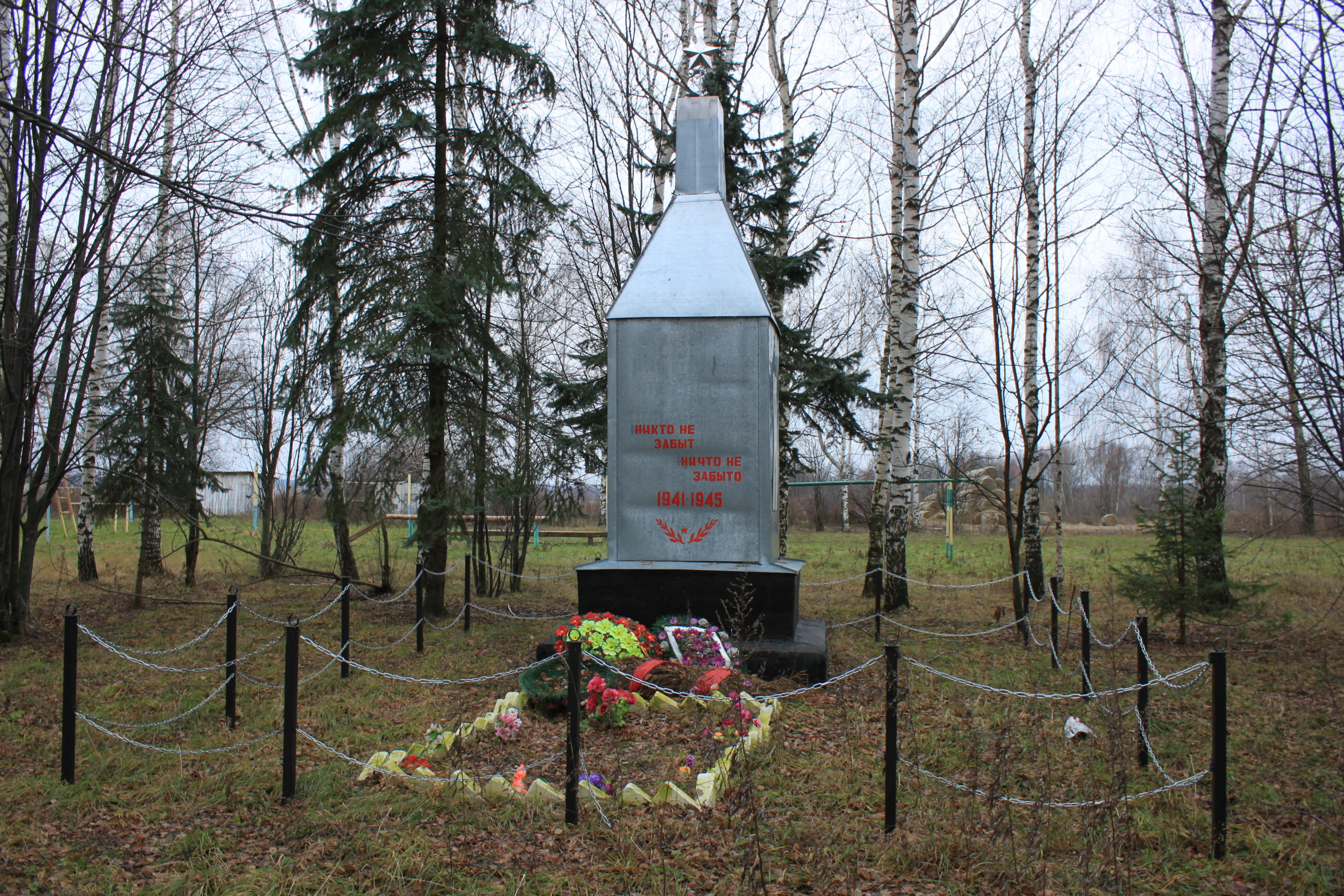 Monument aux Héros